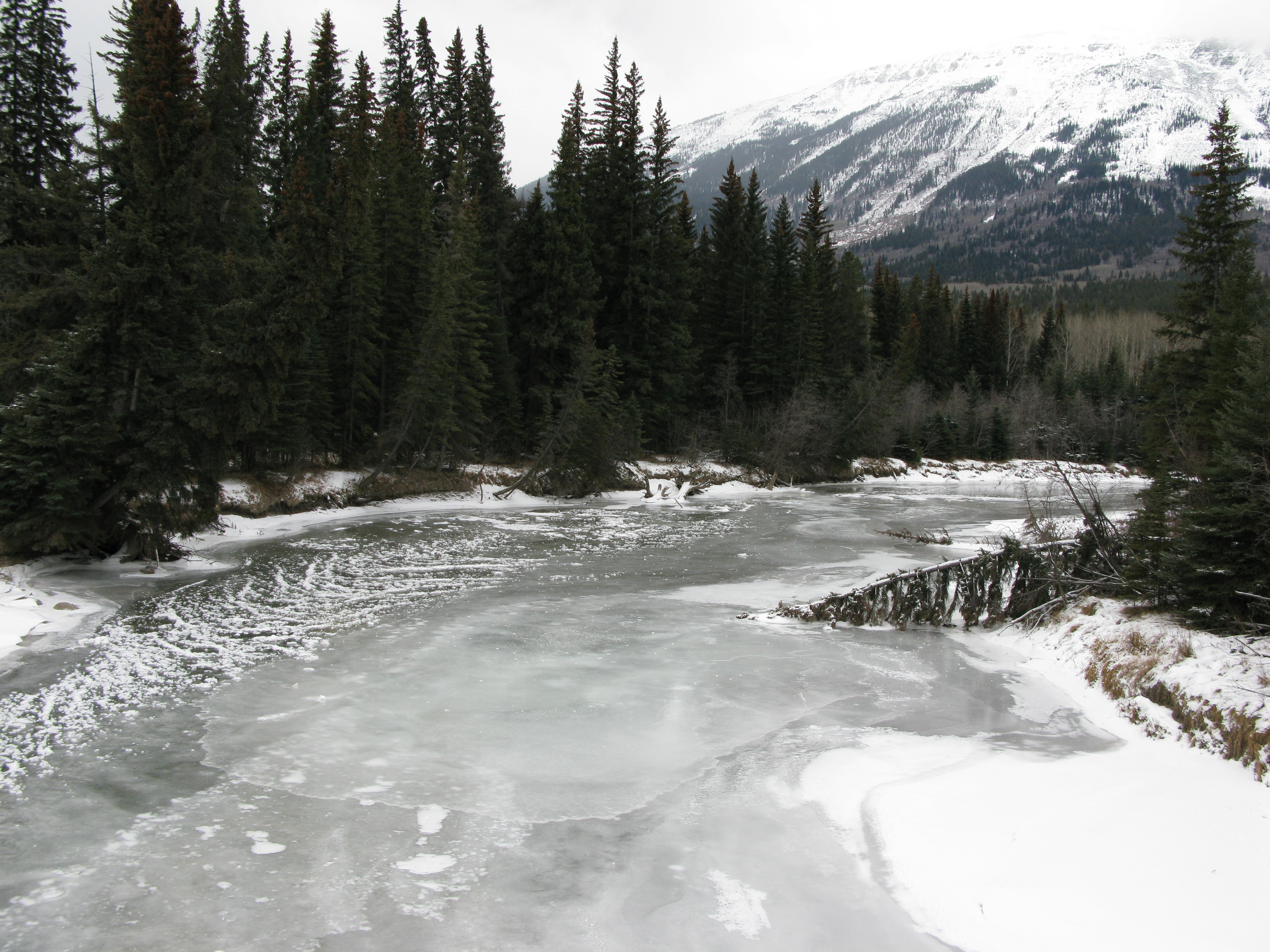 MietteRiver